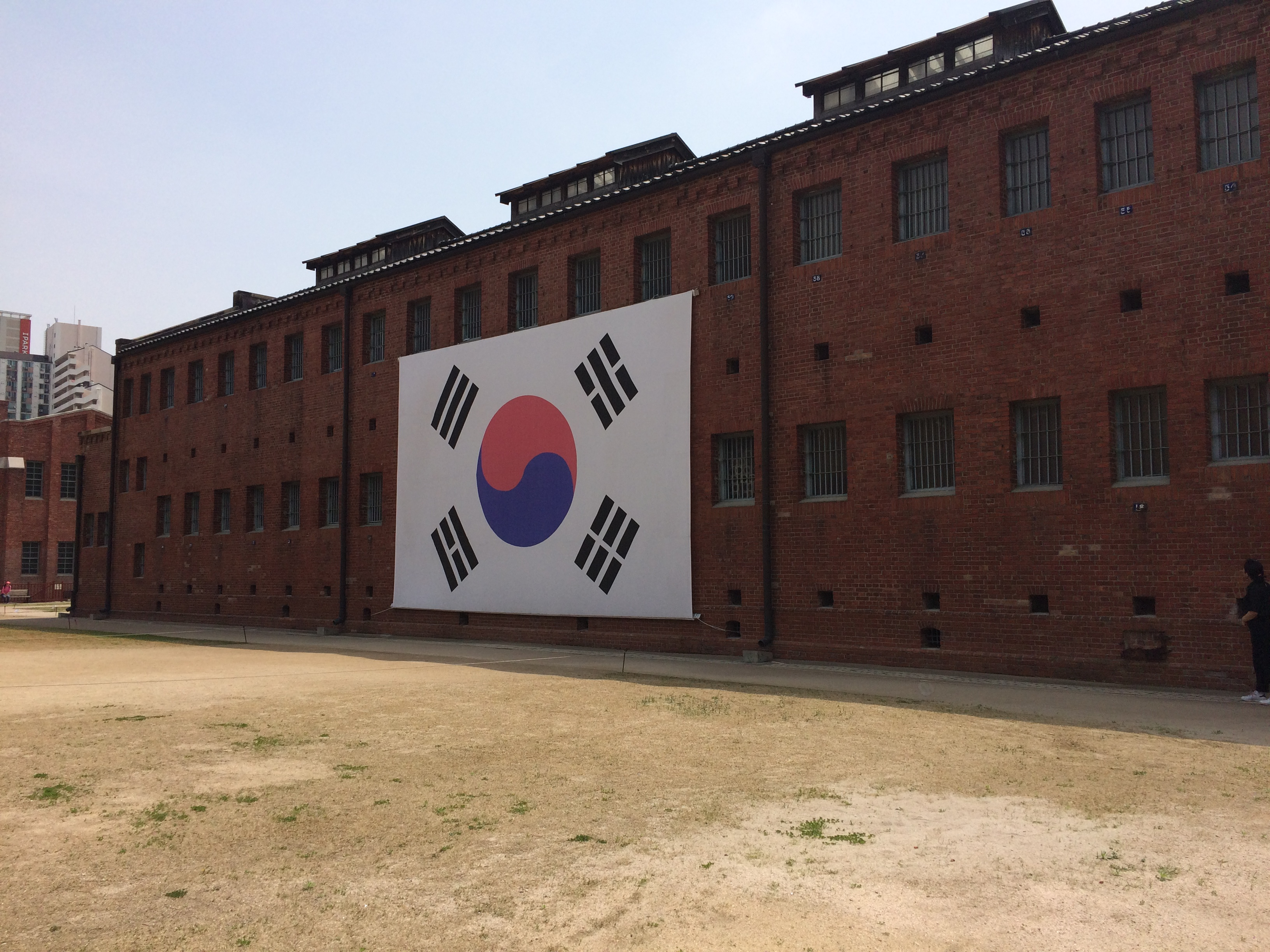 Photo de la prison de Seodaemun, située à Séoul.